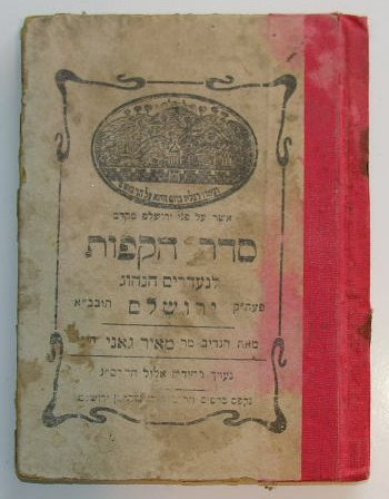 סדר הקפות מאת הנדיב מר מאיר גאני